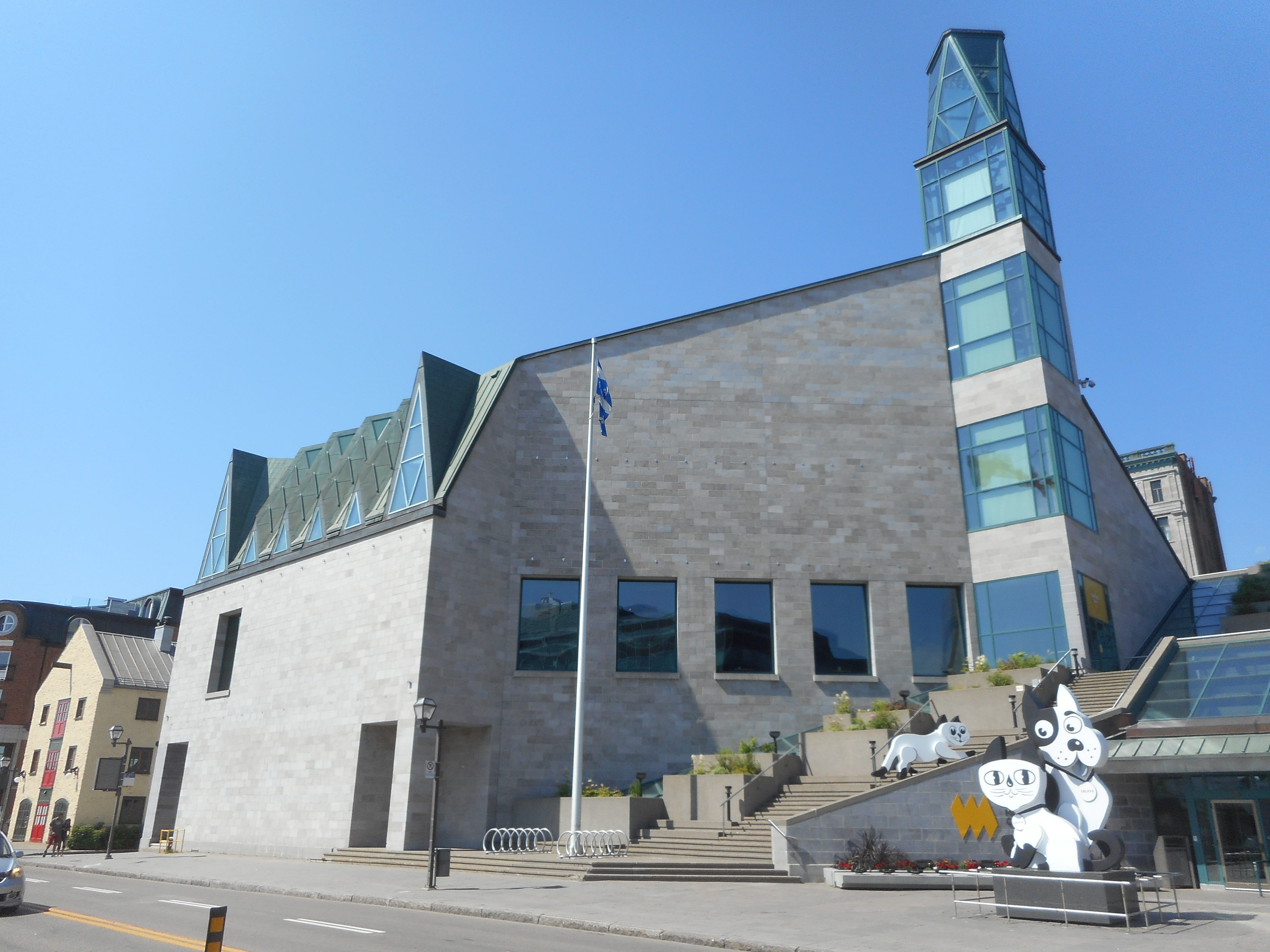 Musée de la civilisation, Québec